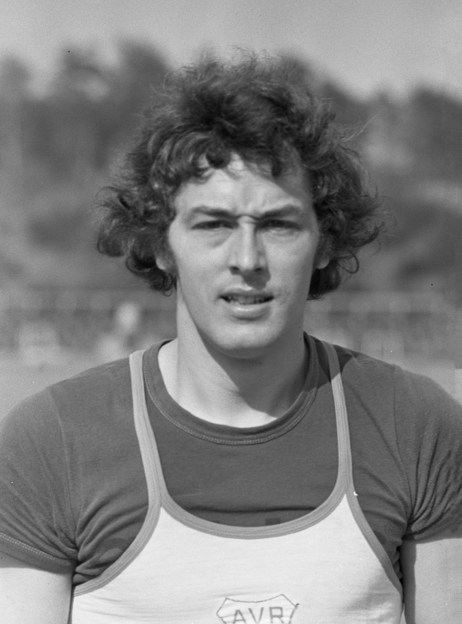 Nederlands Kampioenschap Tienkamp op Papendal, nummer 27 Ed de Noorlander (kop)